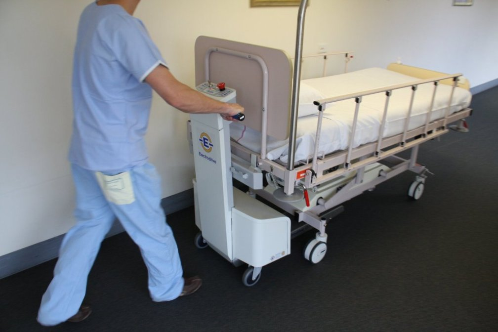 Gzunda Bed Mover